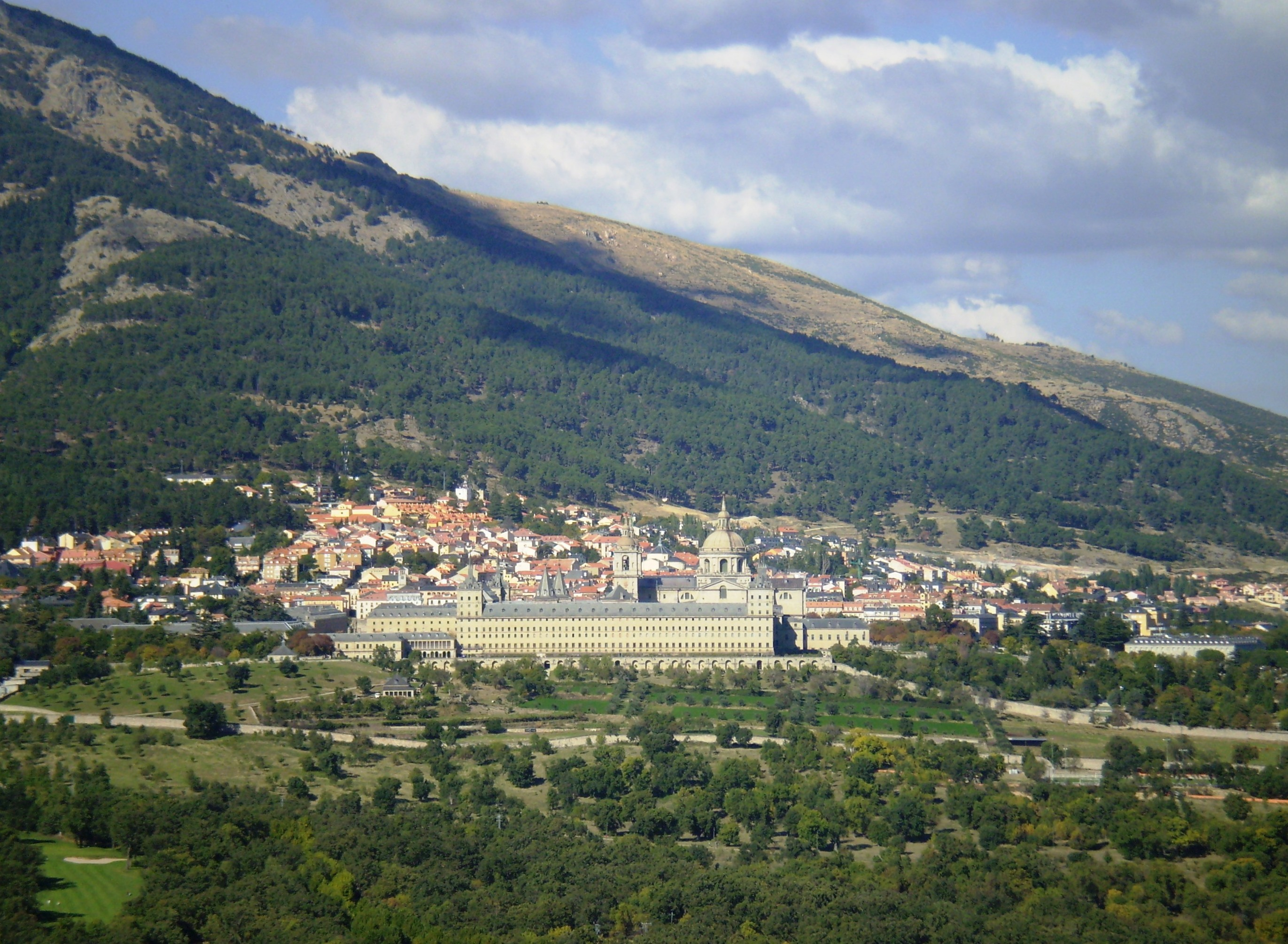 View of San Lorenzo de El Escorial from Philip II Seat. Community of Madrid, Spain. Vista de San Lorenzo de El Escorial desde la Silla de Felipe II. Comunidad de Madrid, España